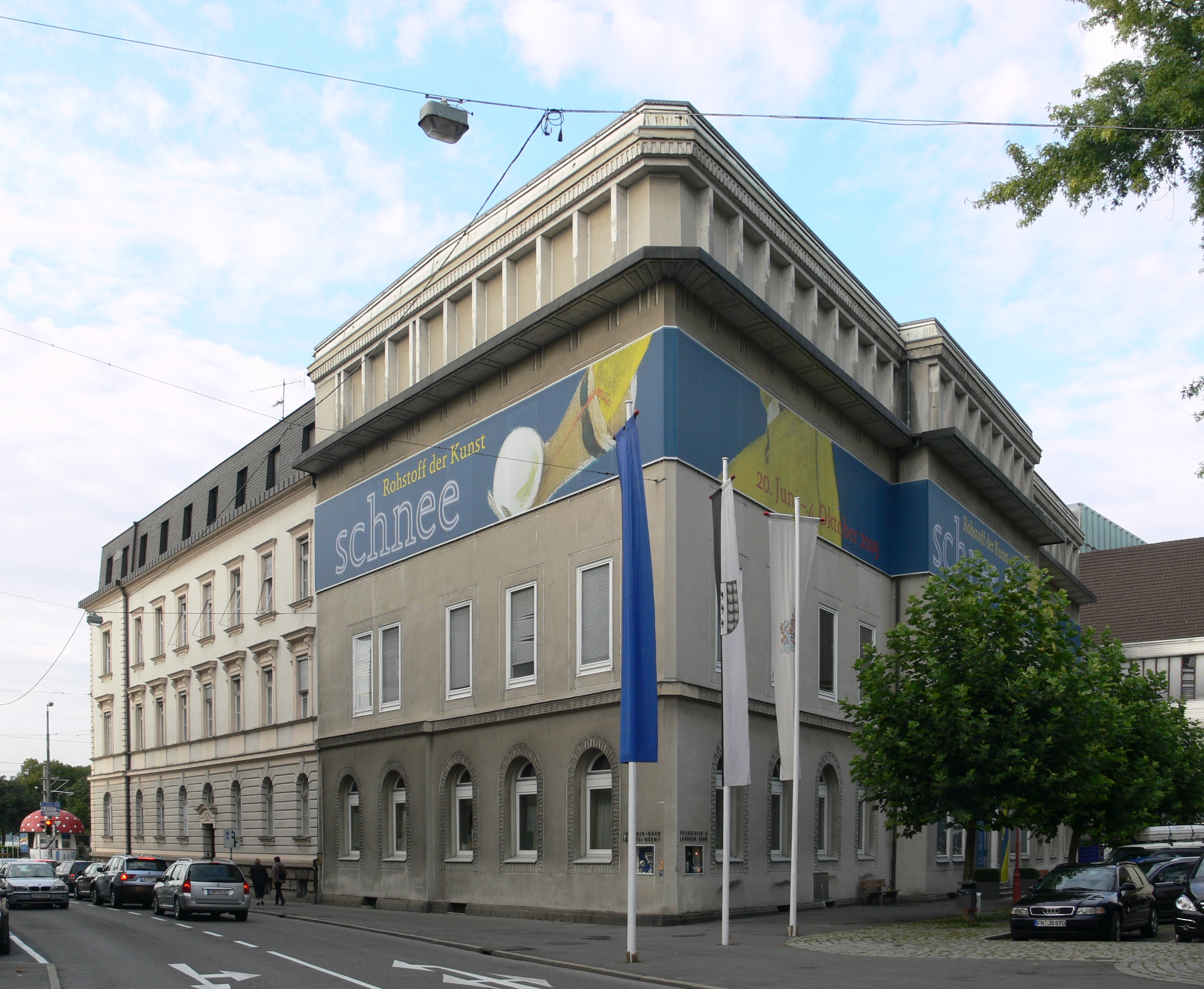 Vorarlberger Landesmuseum, Bregenz Fassade zur Rathausstraße (links) und zum Kornmarkt (rechts), 2009